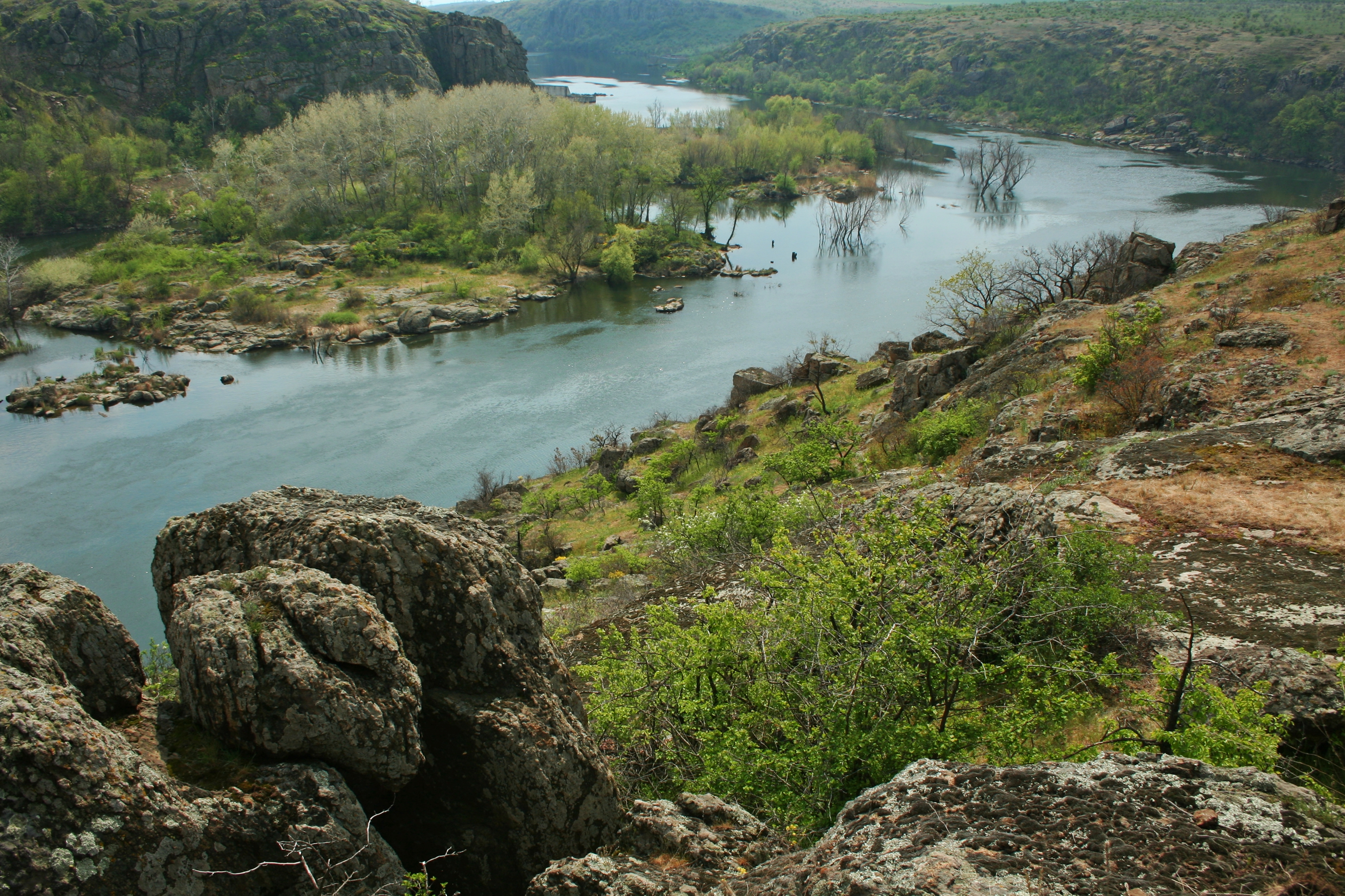 Історичний ландшафт центру Буго-Гардівської паланки Війська Запорозького, місто :uk:Южноукраїнськ,смт Костянтинівка Арбузинського району,село Богданівка Доманівського району